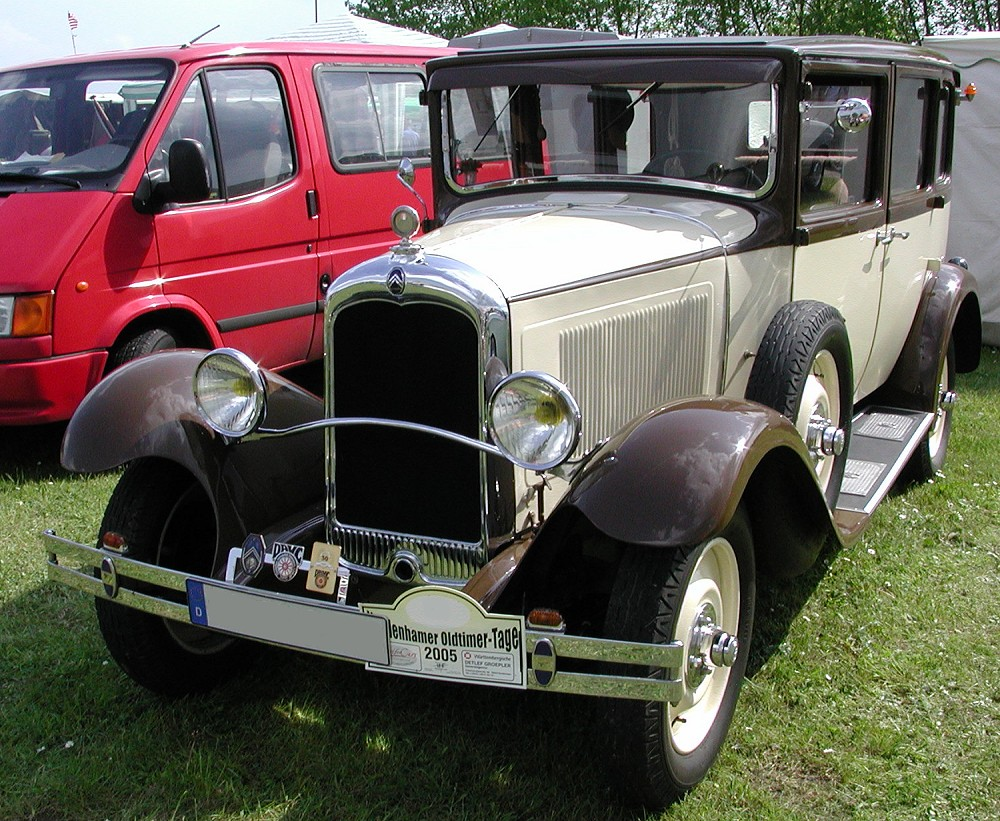 Oldtimer - Citroën C4F Famille Deluxe, 1929